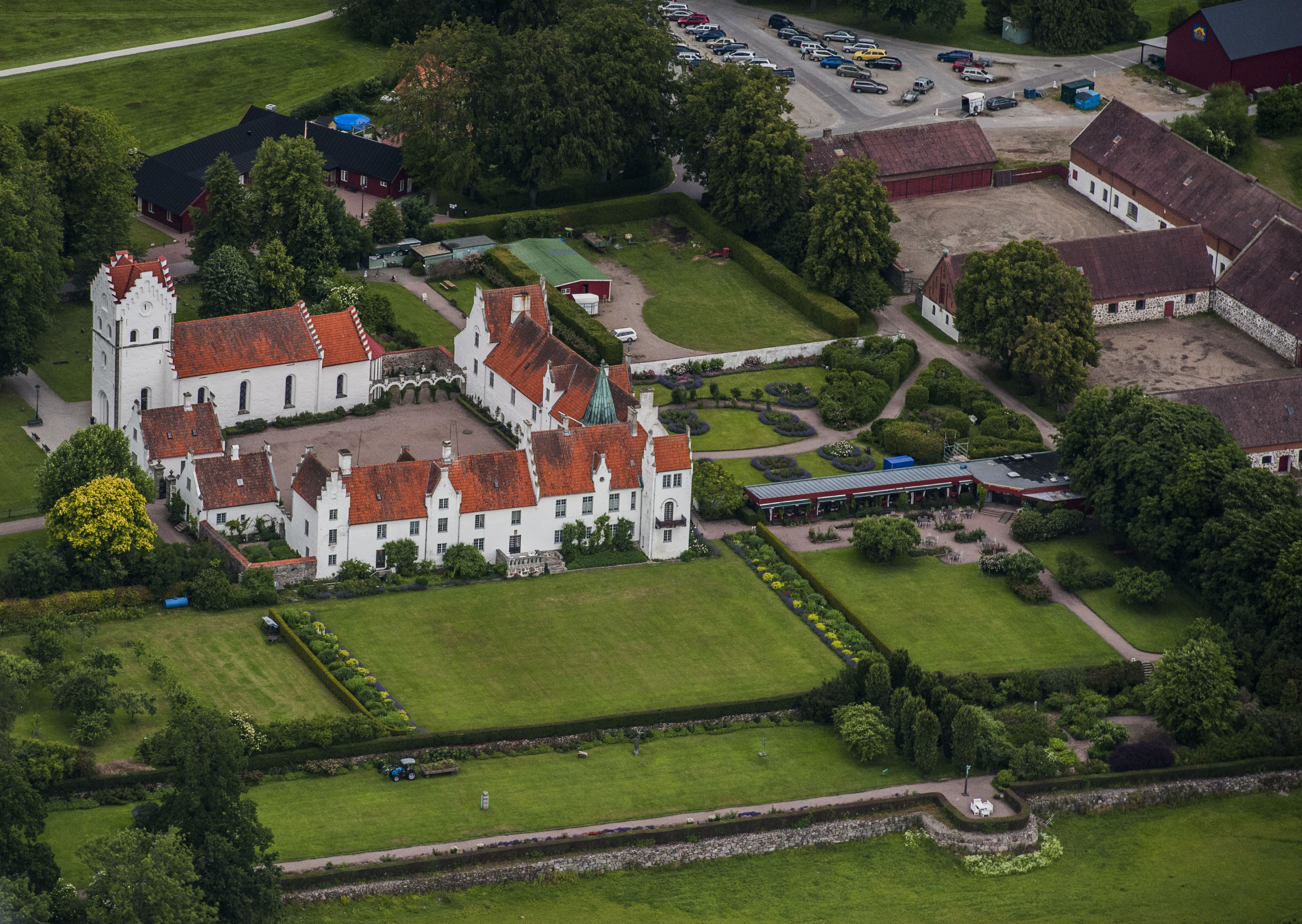 Bosjökloster